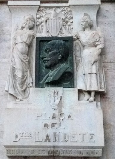 Relieve escultórico costeado por el colectivo de odontólogos valencianos, en 1923, en homenaje al Dr. Landete. Erigido en la plaza de Valencia que lleva su nombre.